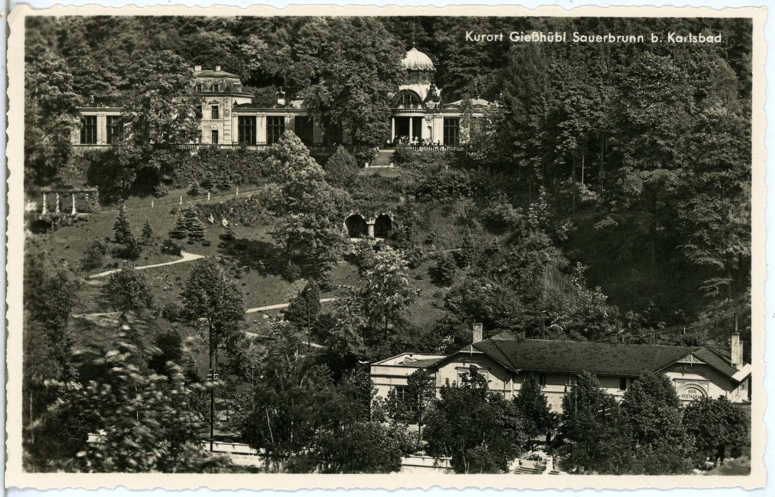 Gieshübel-Sauerbrunn; Kurrestaurant This postcard is from publisher Brück & Sohn in Meißen ( postcard has a unique number 27475 and is available in a higher resolution at the publisher. This images was uploaded in a cooperation project between Wikipedians and the publisher.